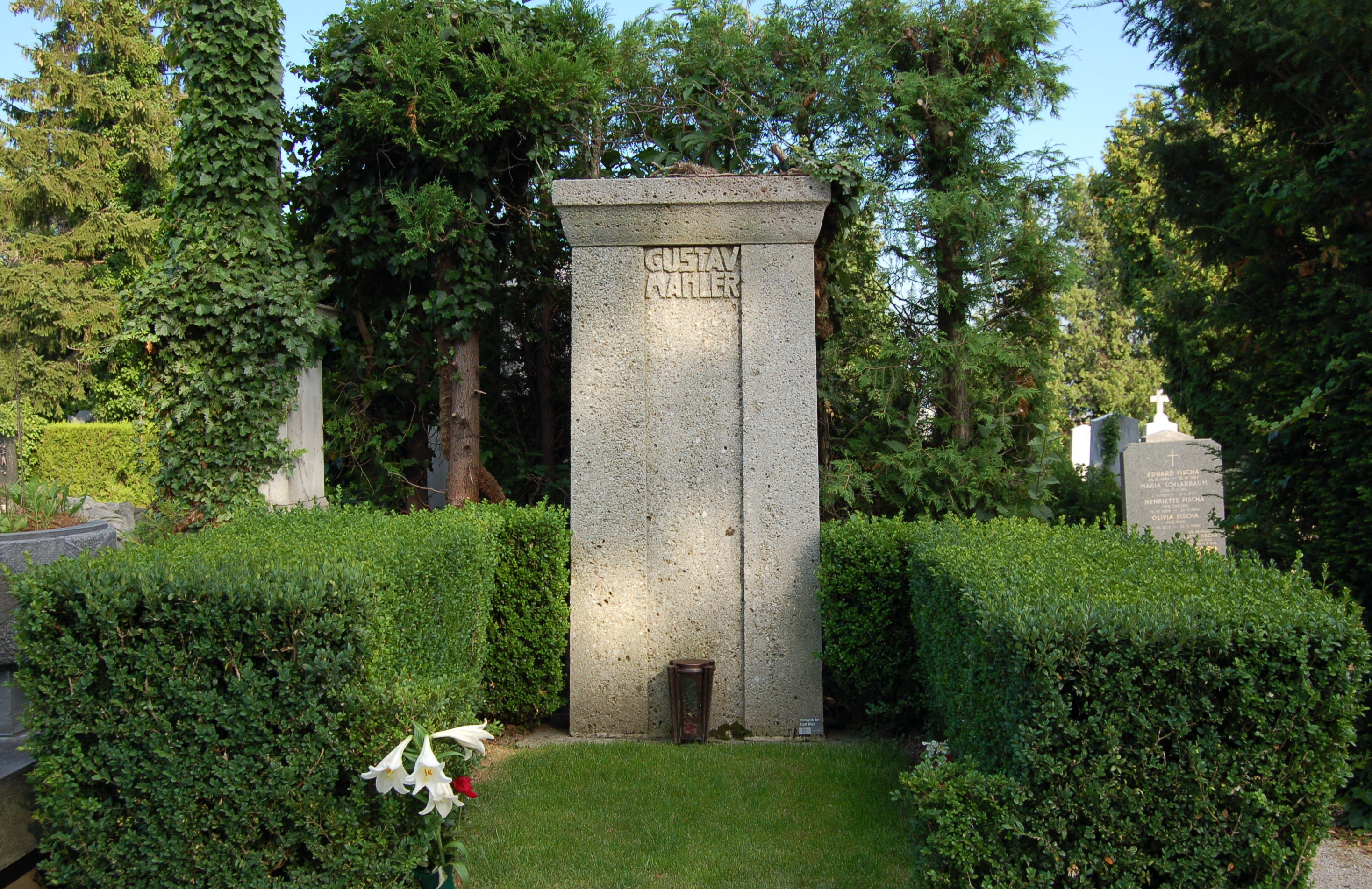 Grinzinger Friedhof, Grabmal von Gustav Mahler, gestaltet von Josef Hoffmann (Architekt)